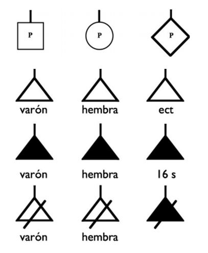 Explicación del pedigrí en casos de embarazo y aborto